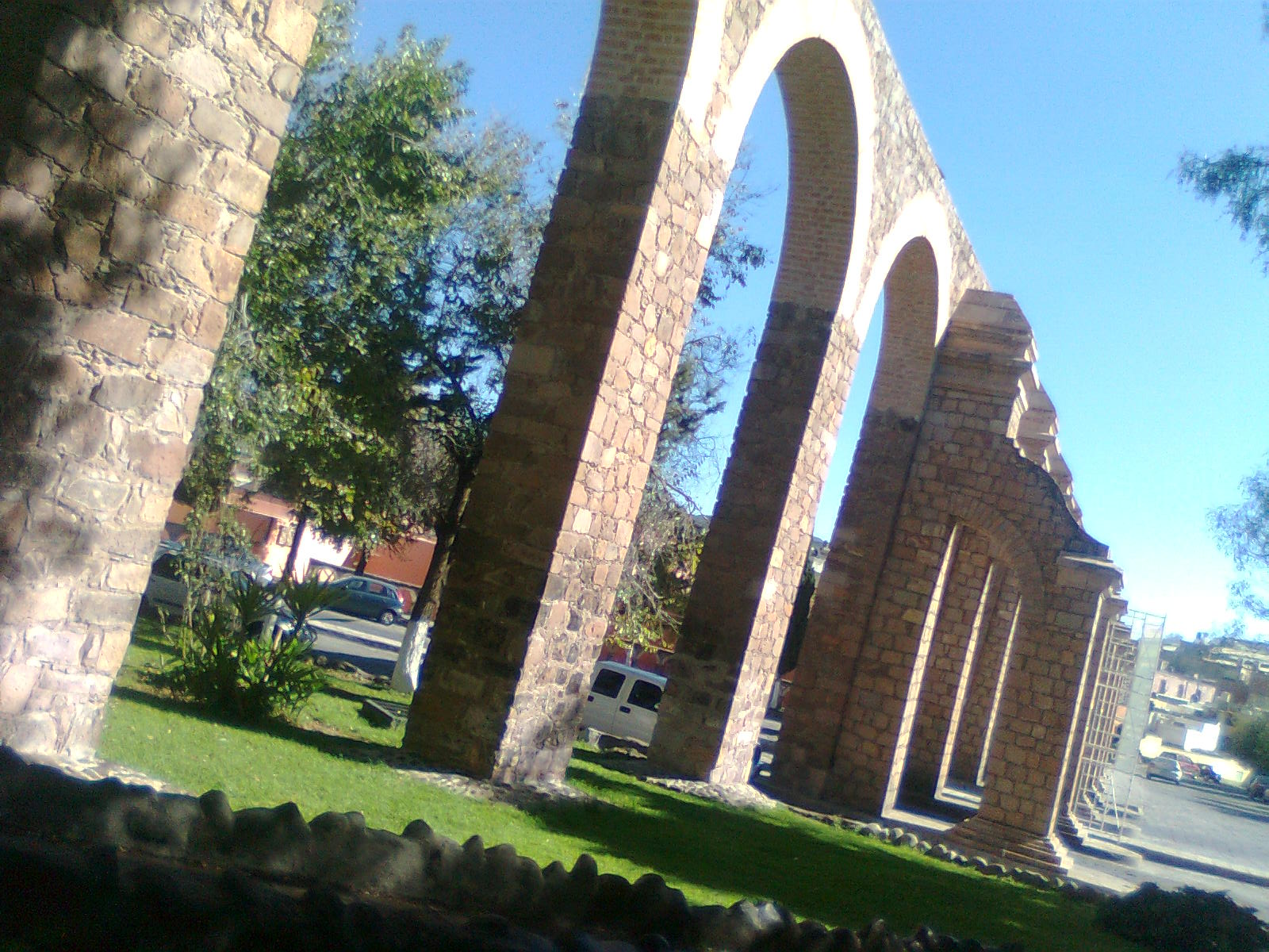 Vista del Acueducto de Zacatecas en Mexico.